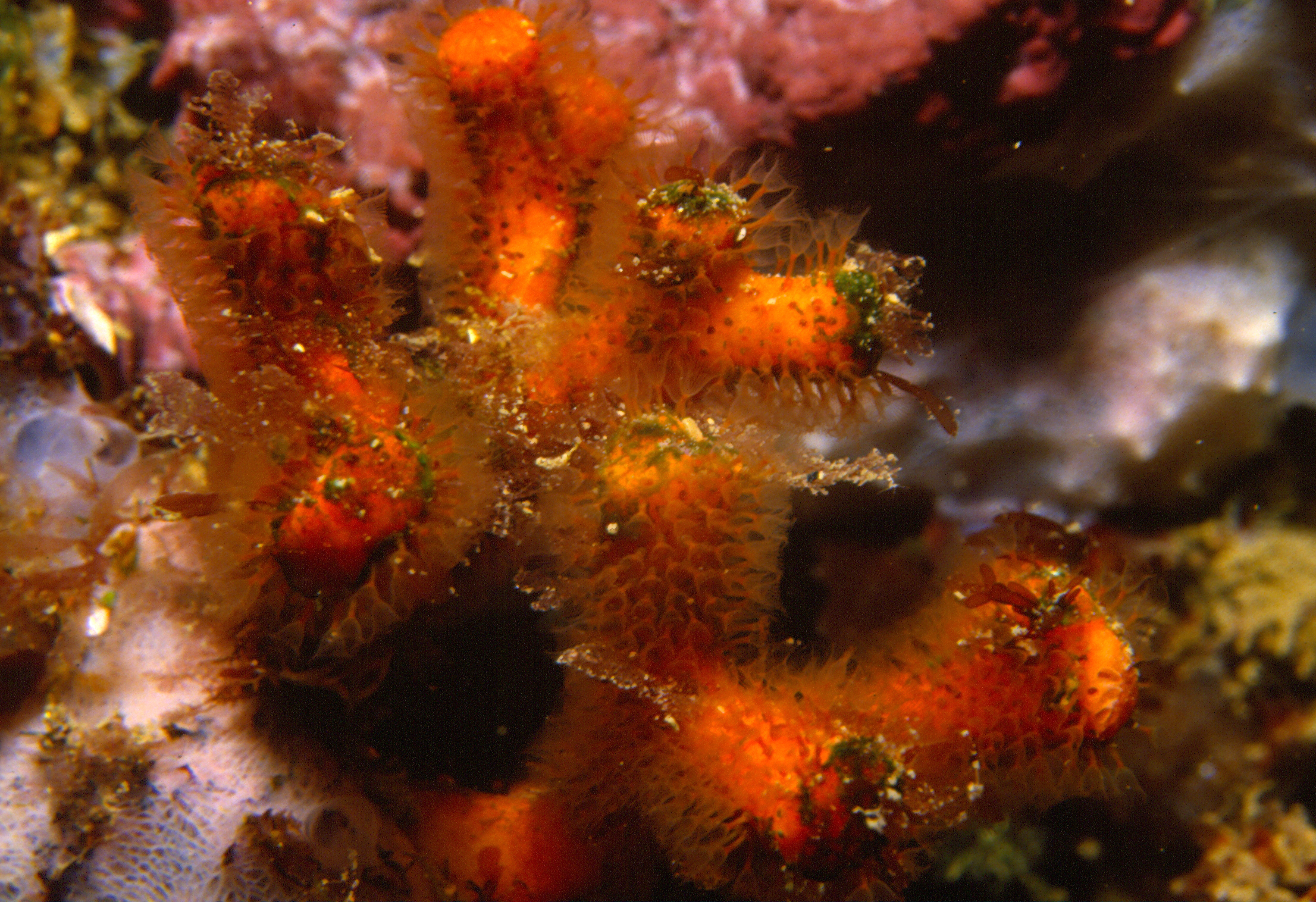 Myriapora truncata (Pallas, 1766) - Banyuls-sur-Mer : 08/84